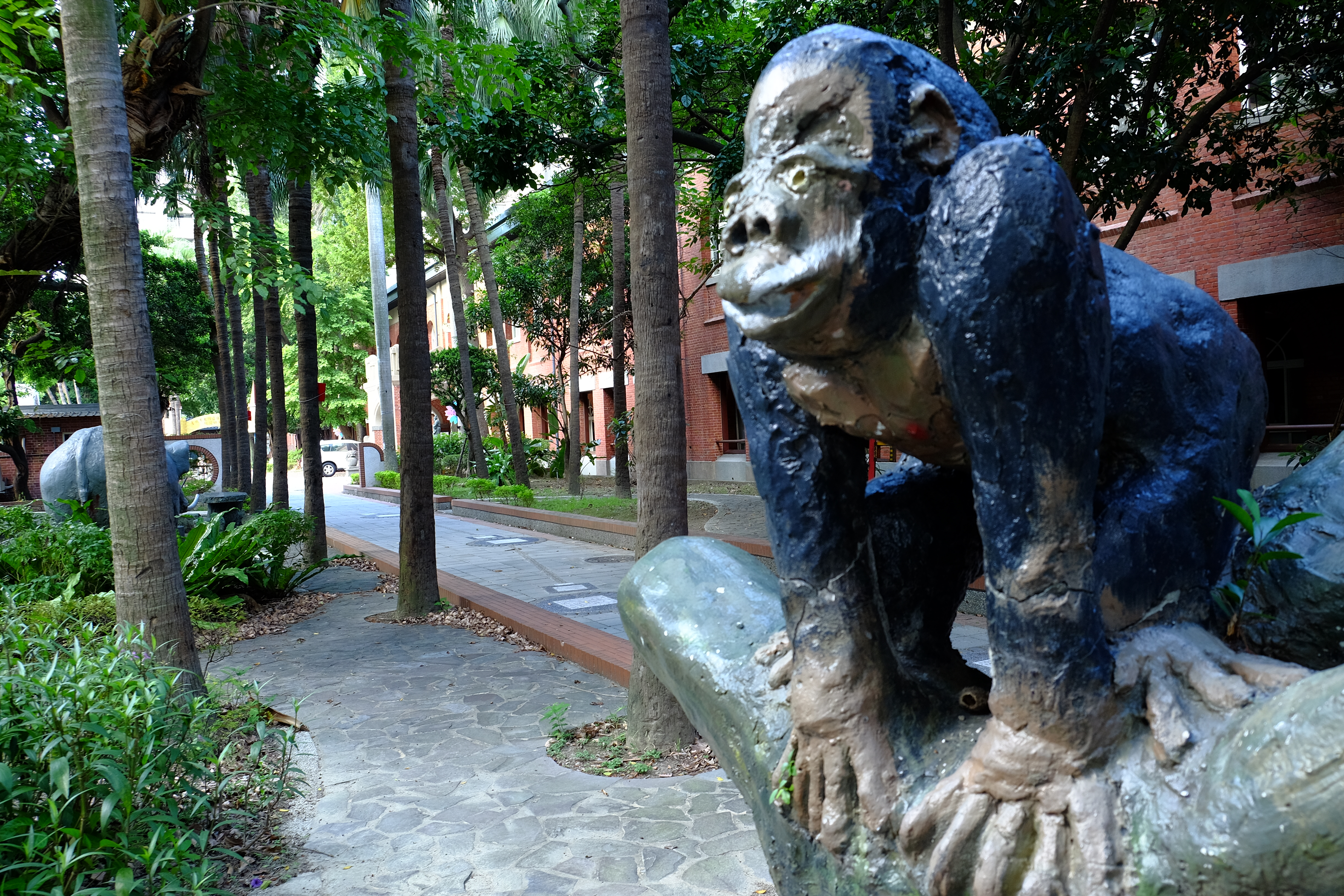 中文（台灣）: 臺北市大同區日新國民小學大猩猩雕像。